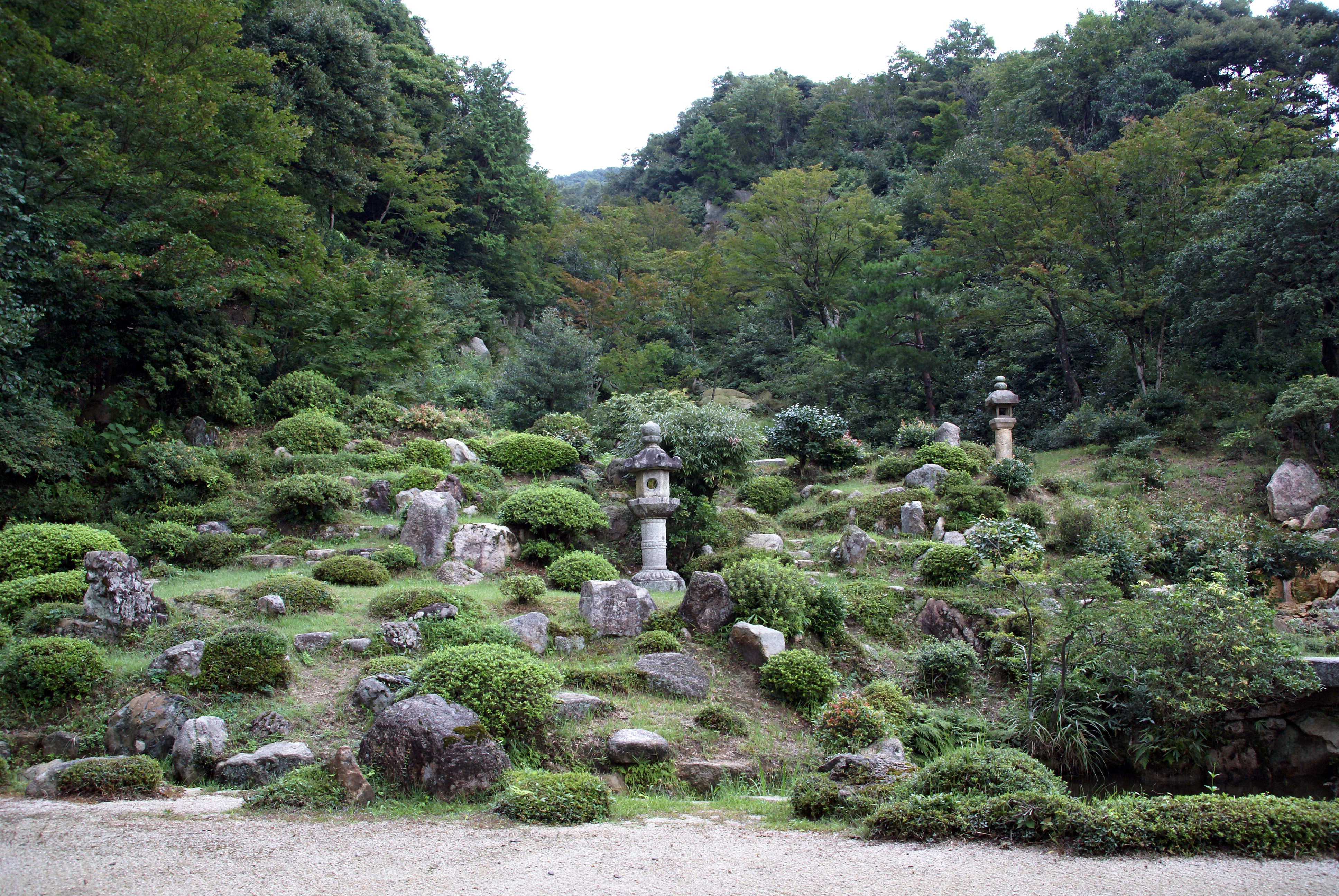 Saifukuji in Tsuruga, Fukui prefecture, Japan